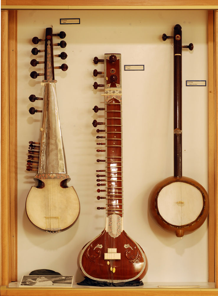 Pultsatutako hariak (5) [1] Indiako Sarod Sitar, eta Iktara Soinuenea - Herri Musikaren Txokoa (Traditional Music Centre; former Documentation Center of Popular Music) Oiartzun, Gipuzkoa, Spain